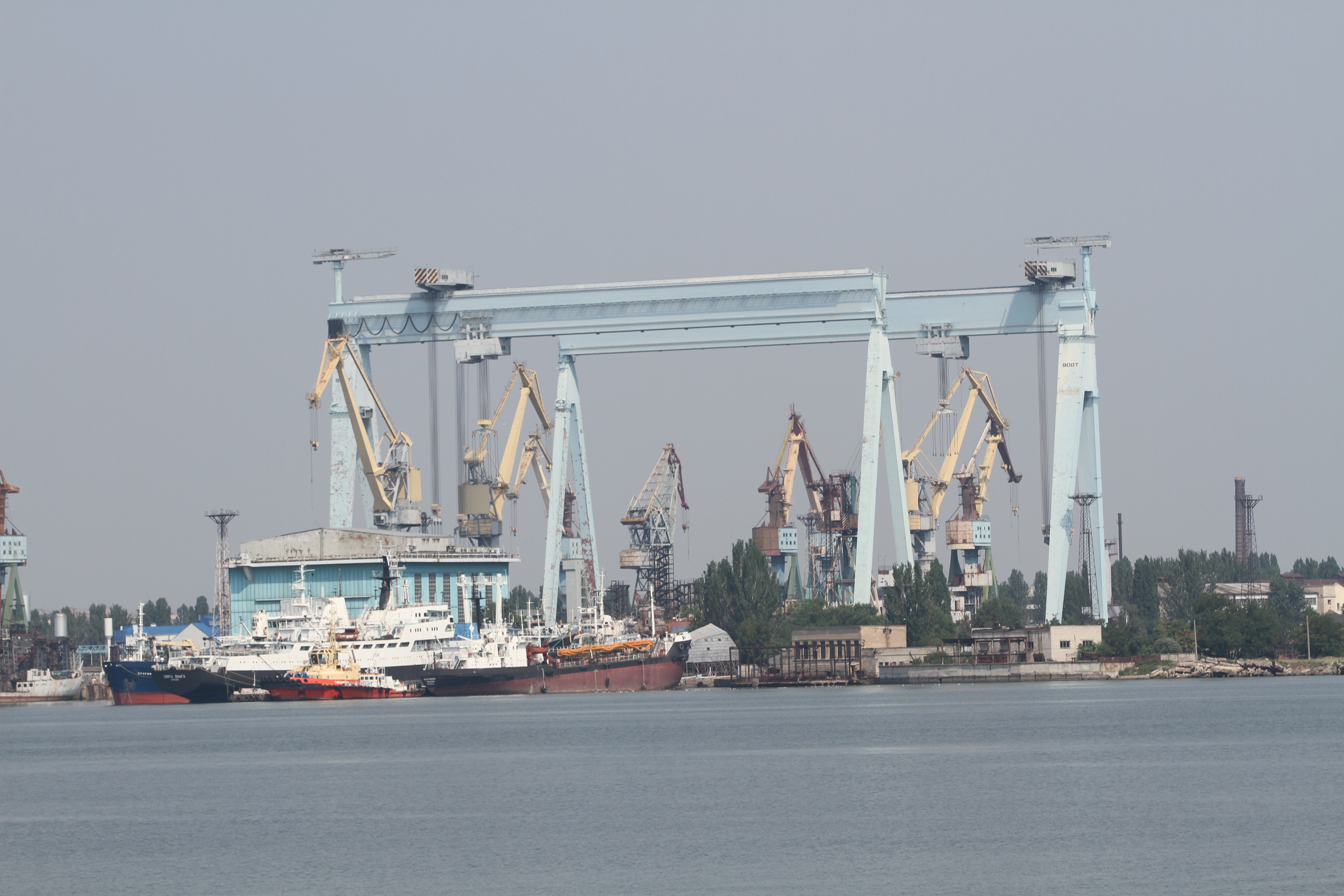 Zavods'kyi district, Mykolaiv, Mykolaivs'ka oblast, Ukraine